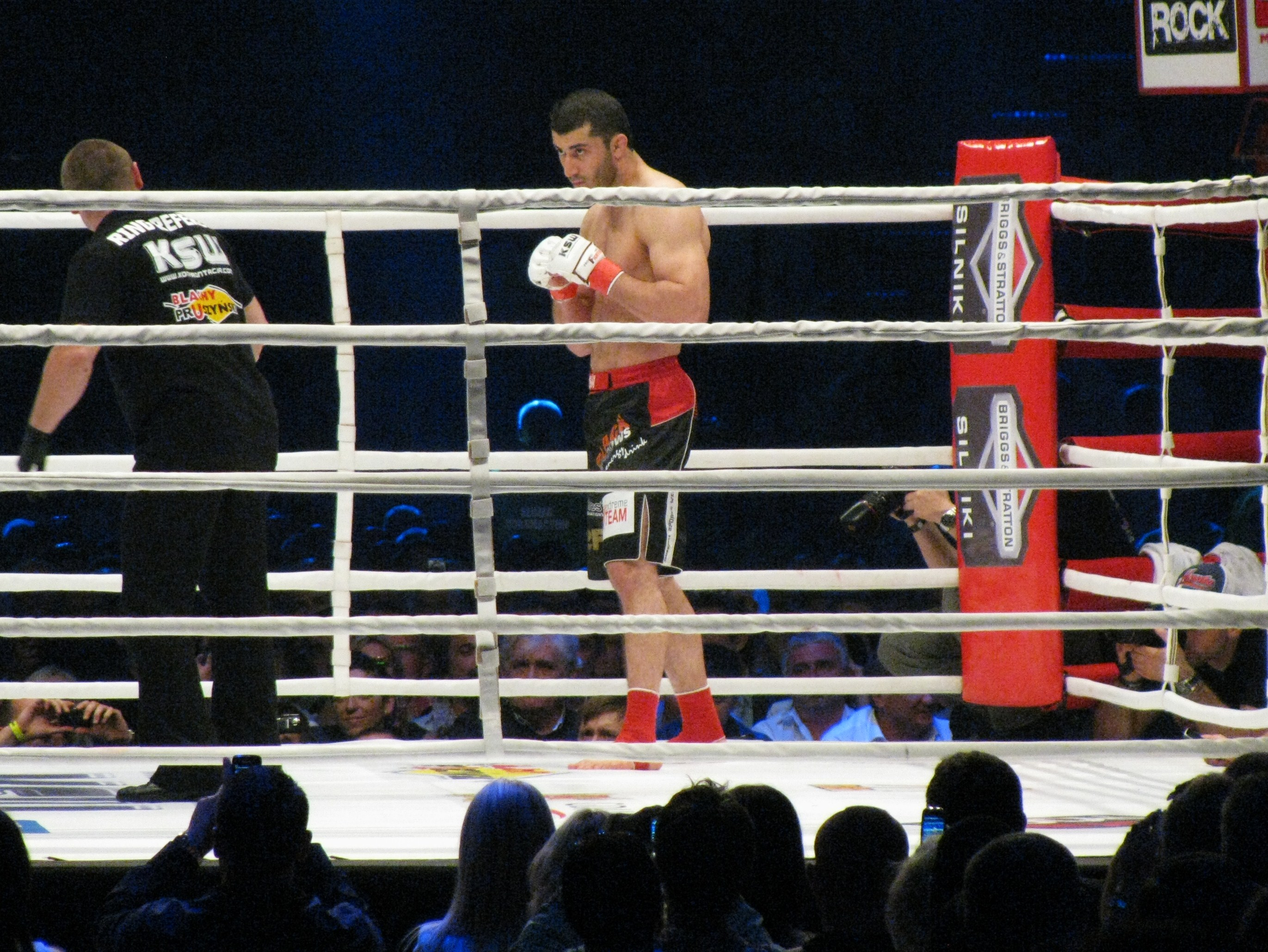 Mamed Khalidov podczas KSW XVI.